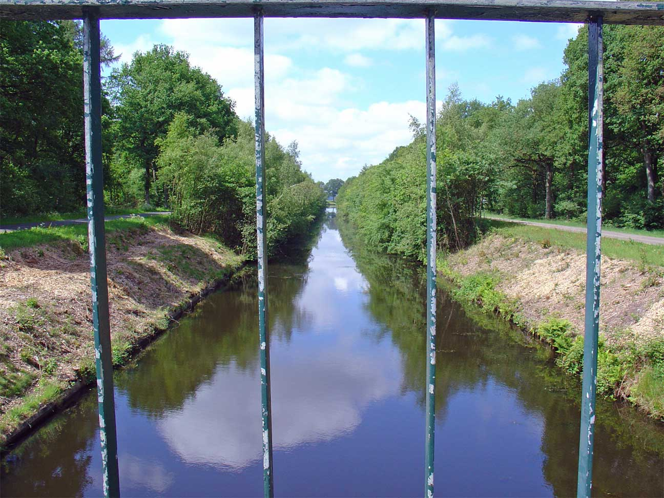 Het Oranjekanaal in de buurt van Schoonoord (Drenthe)